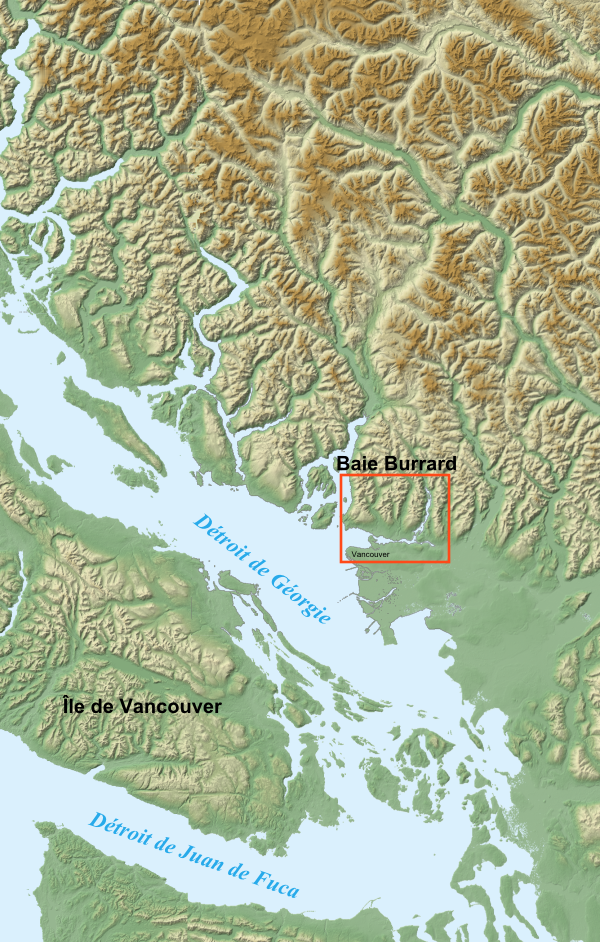 Carte du sud-ouest de la Colombie-Britannique permettant de localiser la baie Burrard. Données cartographiques obtenues sur le site FTPdu SRTM (Shuttle Radar Topography Mission) de la NASA. Visualisation des données sur le logiciel 3DEM de Visualization Software LLC. Projection UTM. Correction des défauts et assemblage des portions de cartes sur le logiciel de dessin . Carte réalisée en s'aidant du didacticiel de Sting.